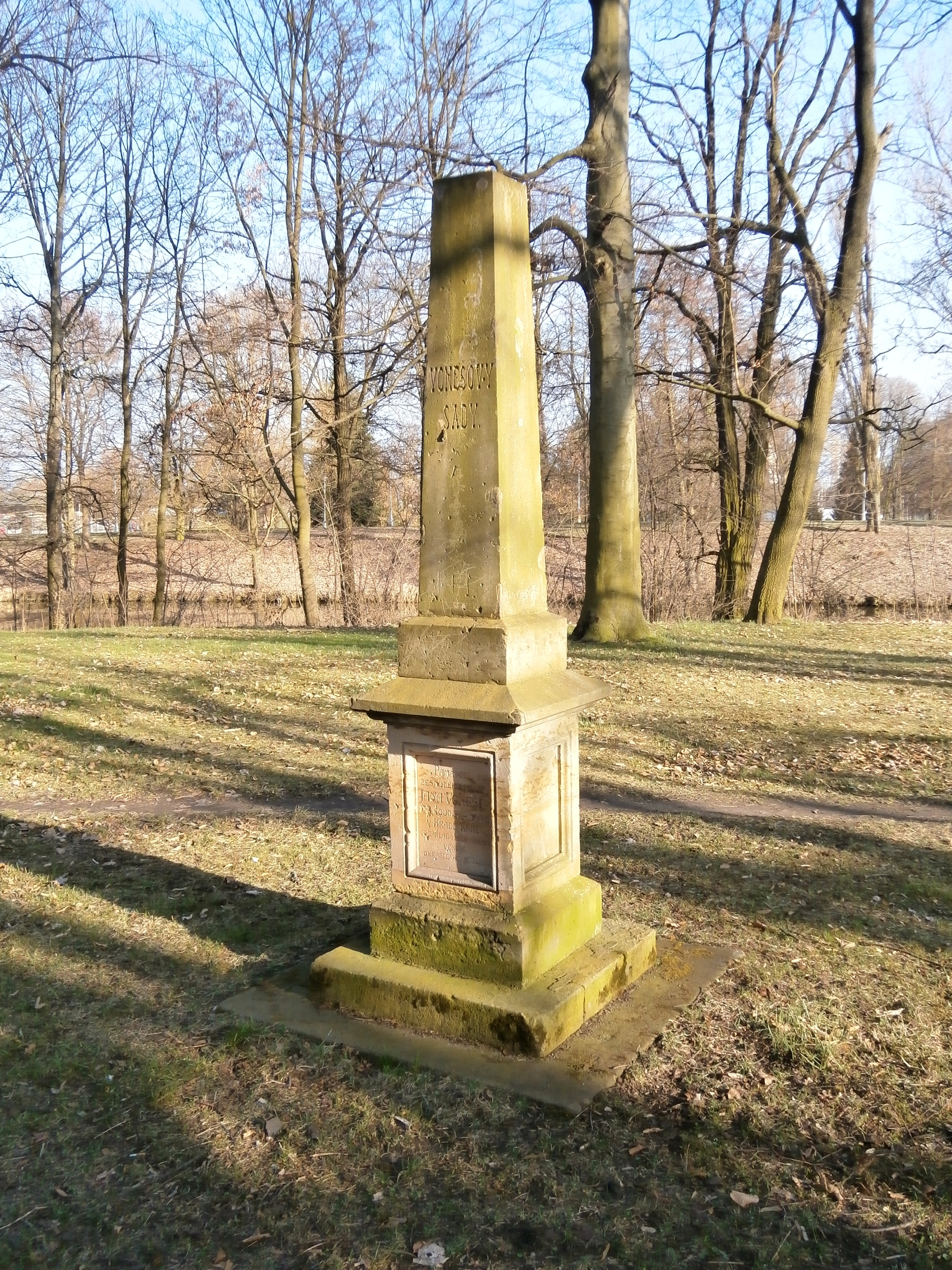 Pomník J. Vonešovi v Sadech Vítězslava Nováka (Hradec Králové)